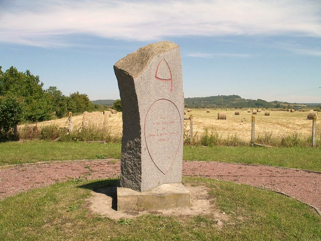 stèle commémorant la bataille du 22 mars 1057 où Guillaume de Normandie vainc l'armée du Roi de France Henri Ier